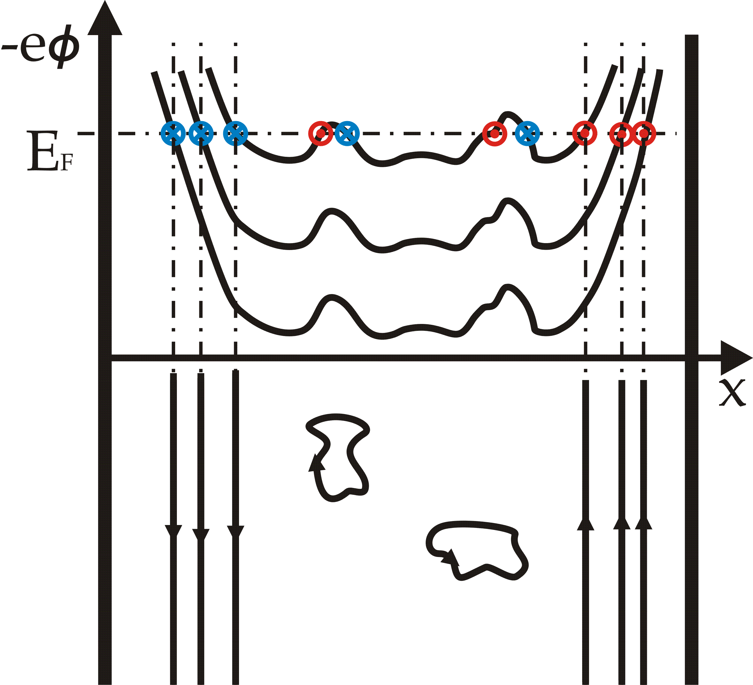 краевые токовые состояния